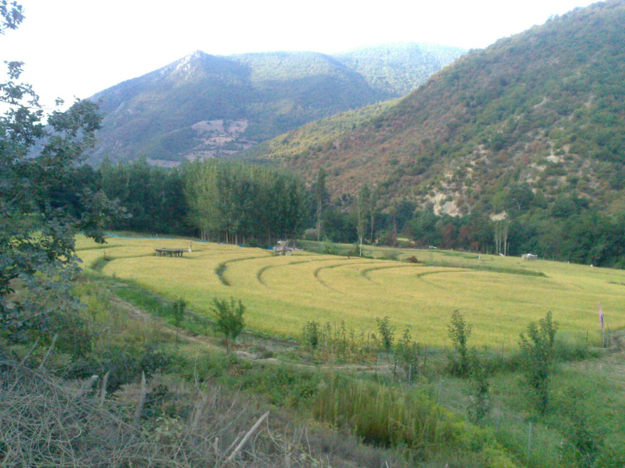 شالیزارهای روستای گلباغ